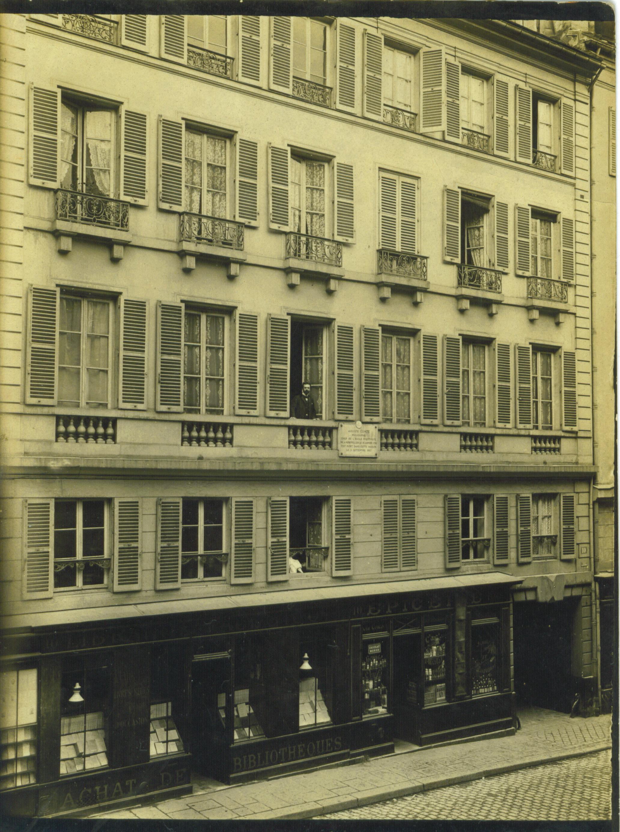 Facade de l'immeuble du 10, rue Monsieur-le-Prince